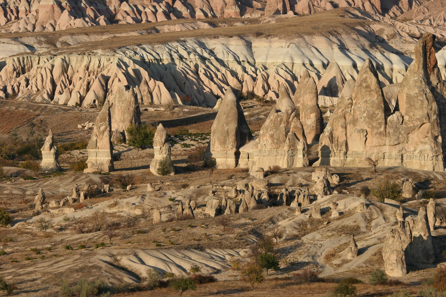 Landschaft bei Göreme, Kappadokien, Türkei